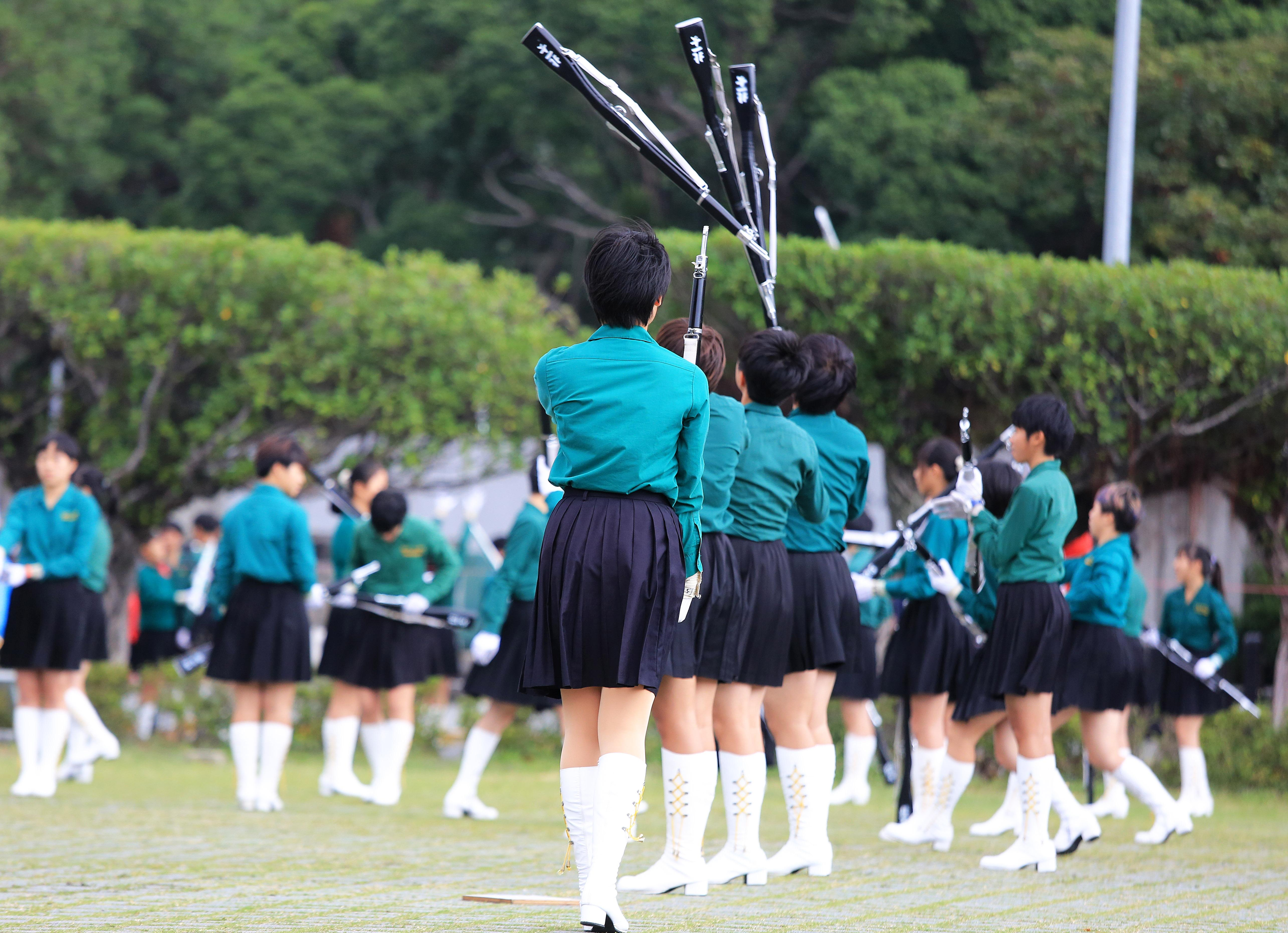 12.30 總統府升旗音樂會預演,由北一女儀隊演出